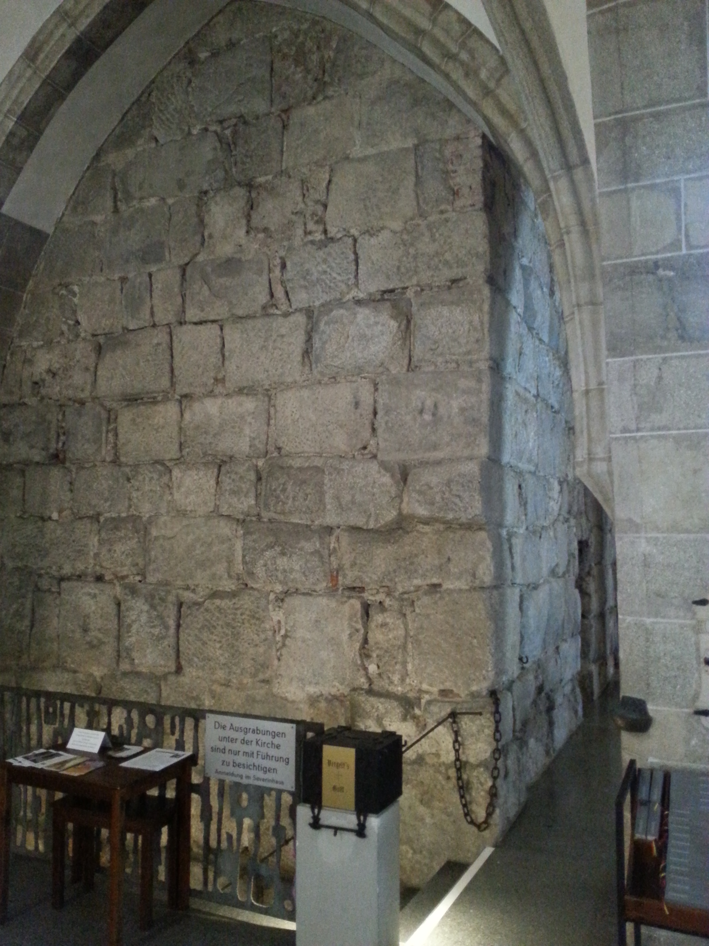 Im Südturm der Basilika von Lorch verbaute Steine aus dem Legionslager Lauriacum.